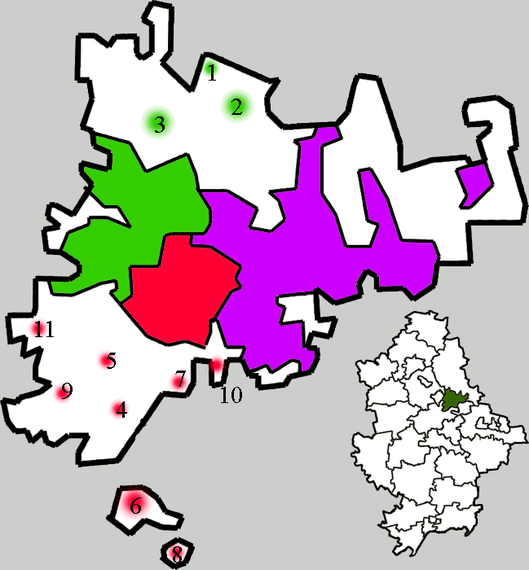 Калининский Никитовский Центральногородской Населённые пункты: 1 — Гладосово 2 — Гольмовский 3 — Зайцево 4 — Михайловка 5 — Озеряновка 6 — Пантелеймоновка 7 — Пятихатки 8 — Рясное 9 — Ставки 10 — Фёдоровка 11 — Широкая Балка